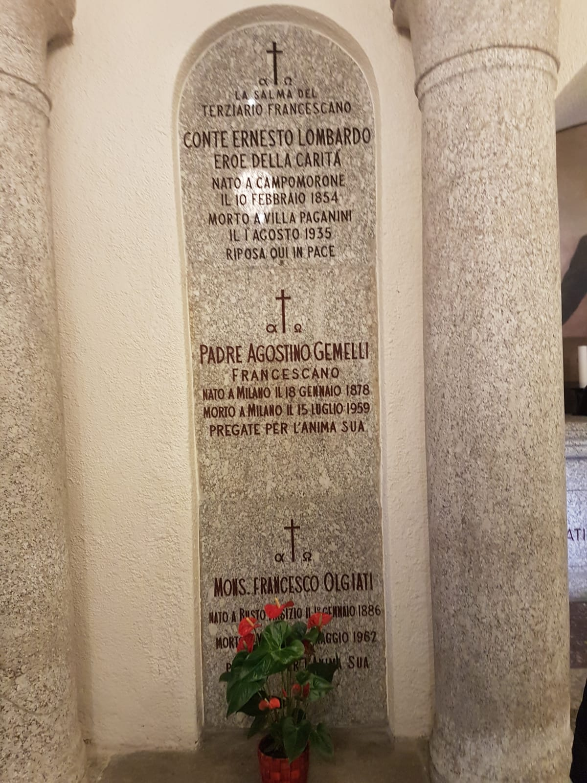 Tomba di padre Agostino Gemelli e mons. Francesco Olgiati - Cripta della Cappella dell'Università del Sacro Cuore di Milano